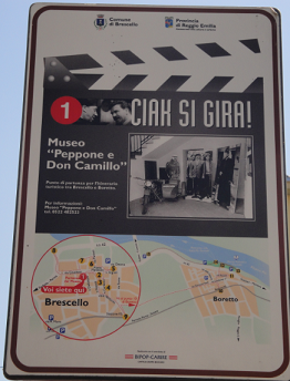 Panneau guidant la visite du village